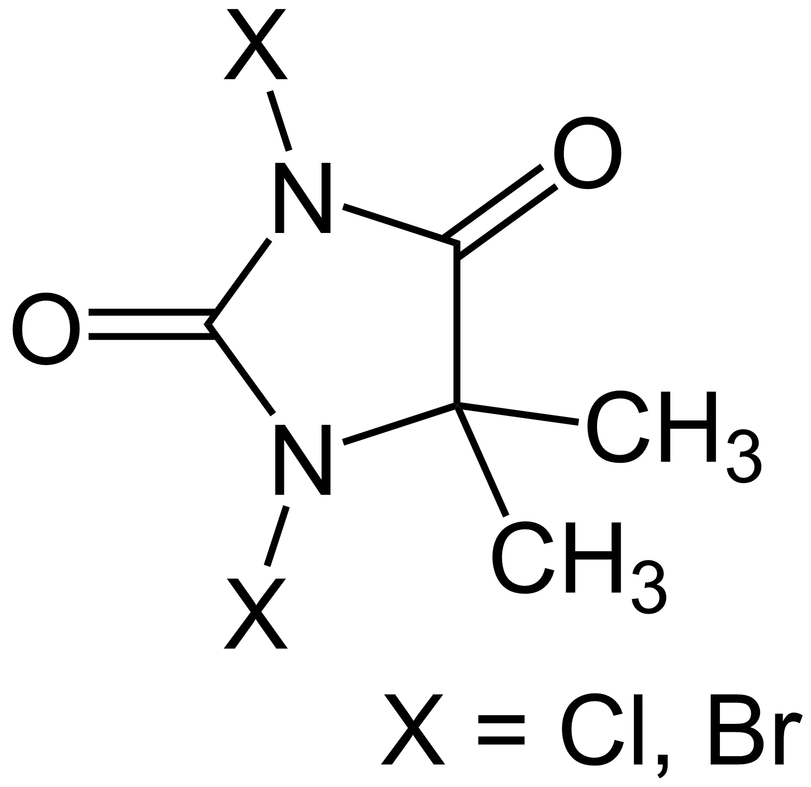 Halogenhydantoine